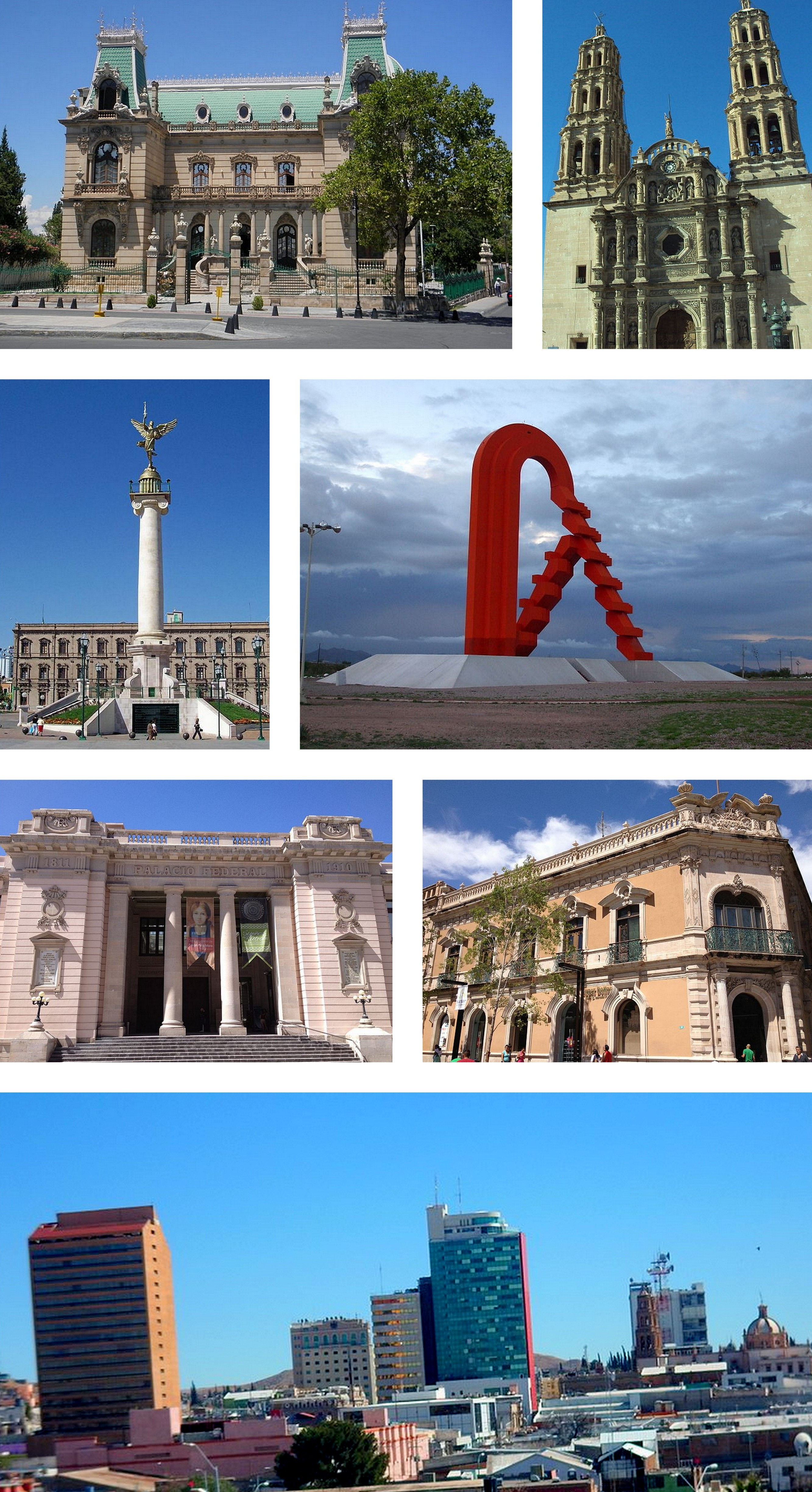 Montaje creado a partir de siete imágenes en Wikimedia Commons: File:Skyline de Chihuahua-Palomar1.jpg File:Palacio Federal, Chihuahua - 2013 - 01.JPG File:Picture 034-Puerta.jpg File:Angel chihuahua.jpg File:Quinta Gameros, Chihuahua.jpg File:Casa Creel, Chihuahua - 2013 - 02.JPG File:Catedral de Chihuahua - 06.JPG